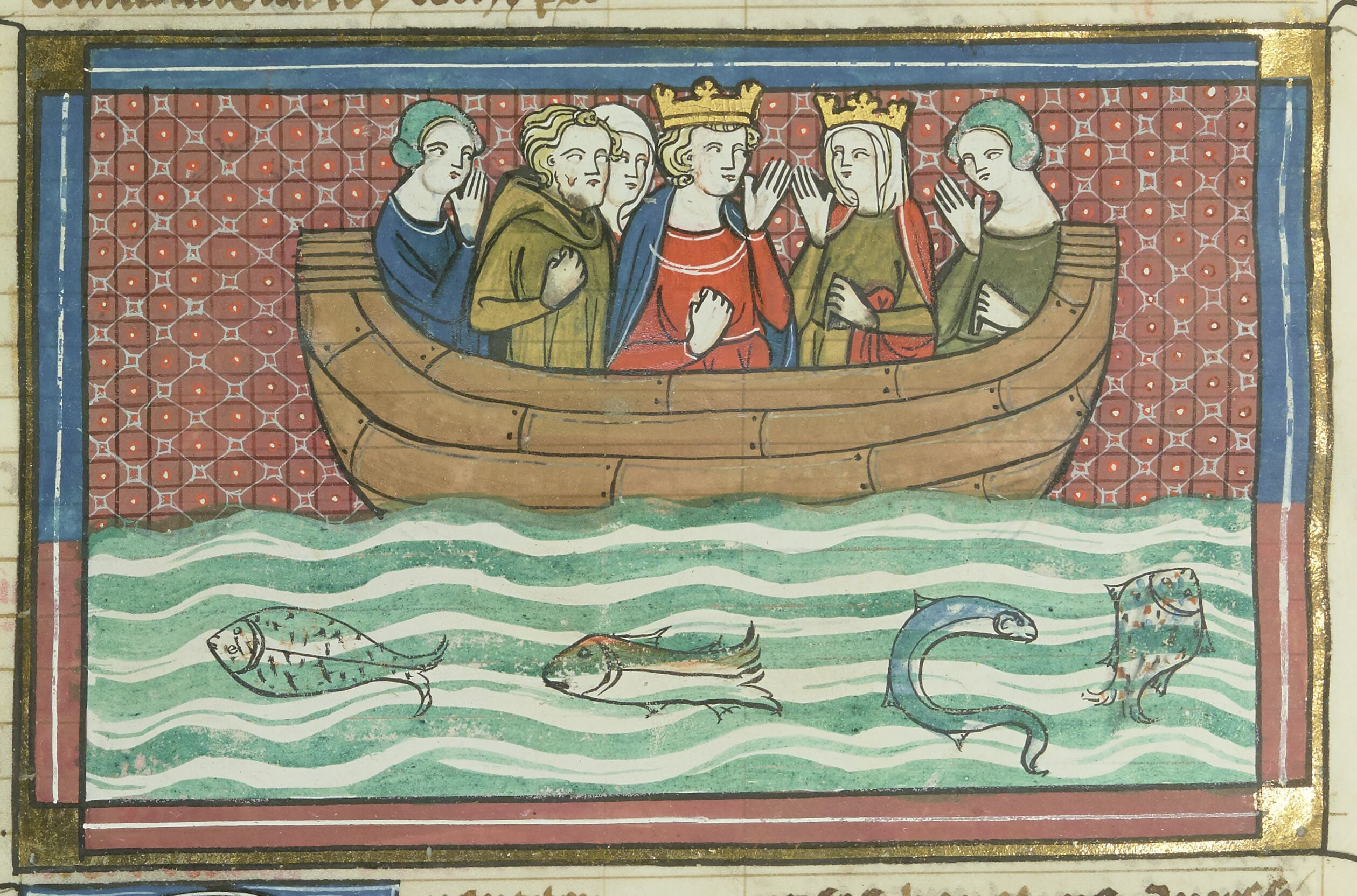 Richard Coeur de Lion naviguant